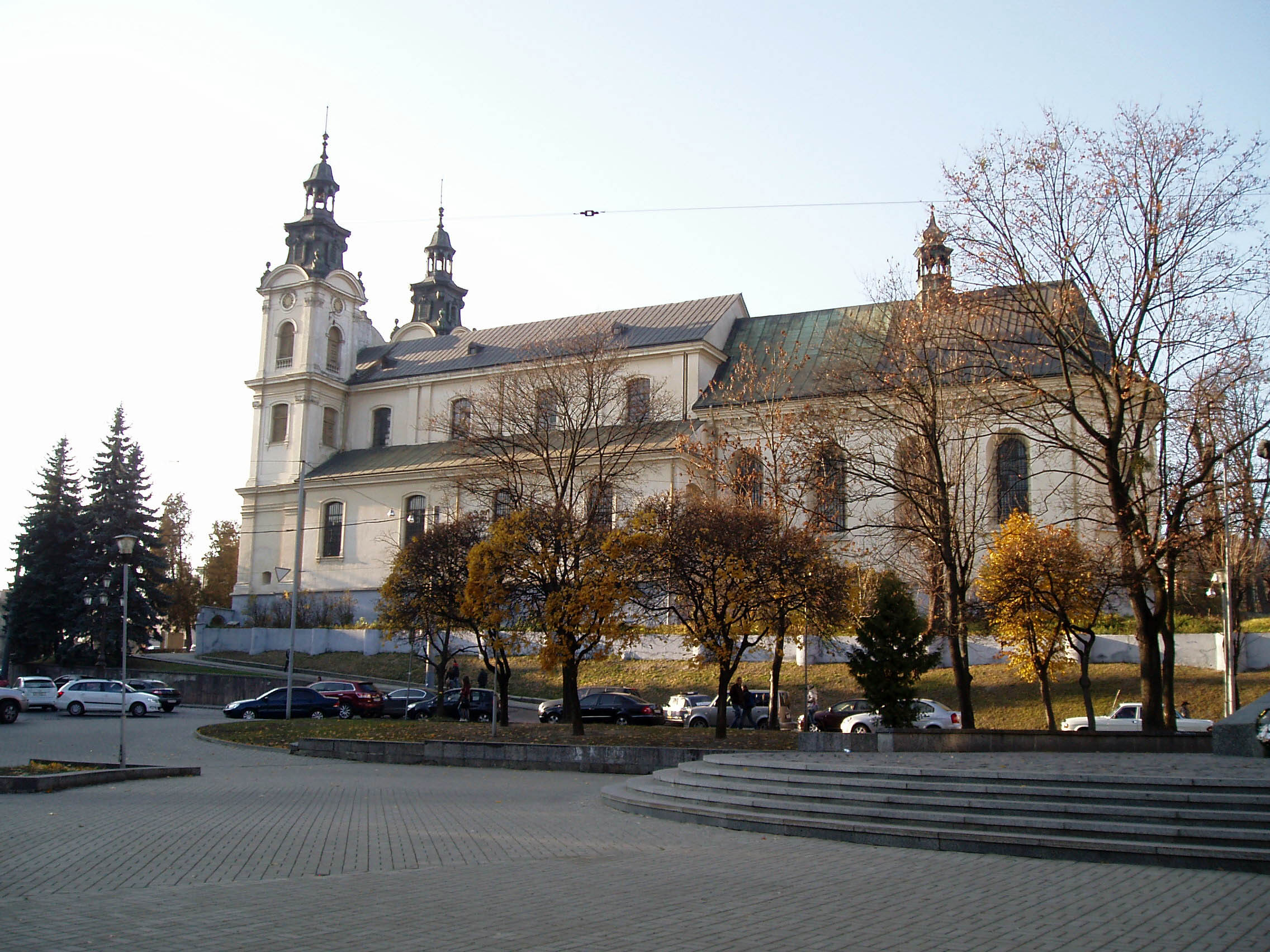 Костел святої Марії Магдалини у Львові. Вигляд з площі Шашкевича.